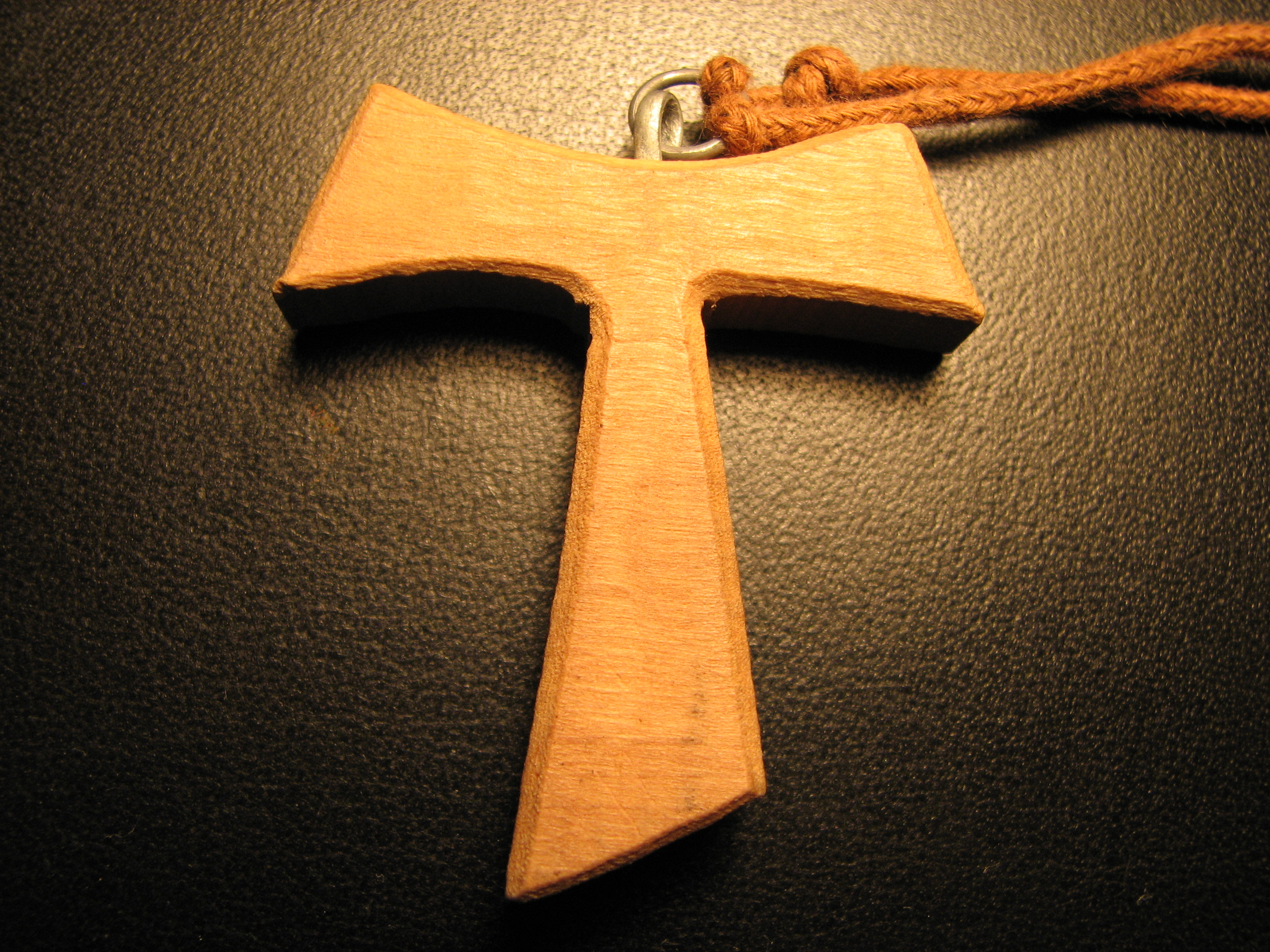 Franciscan Tau